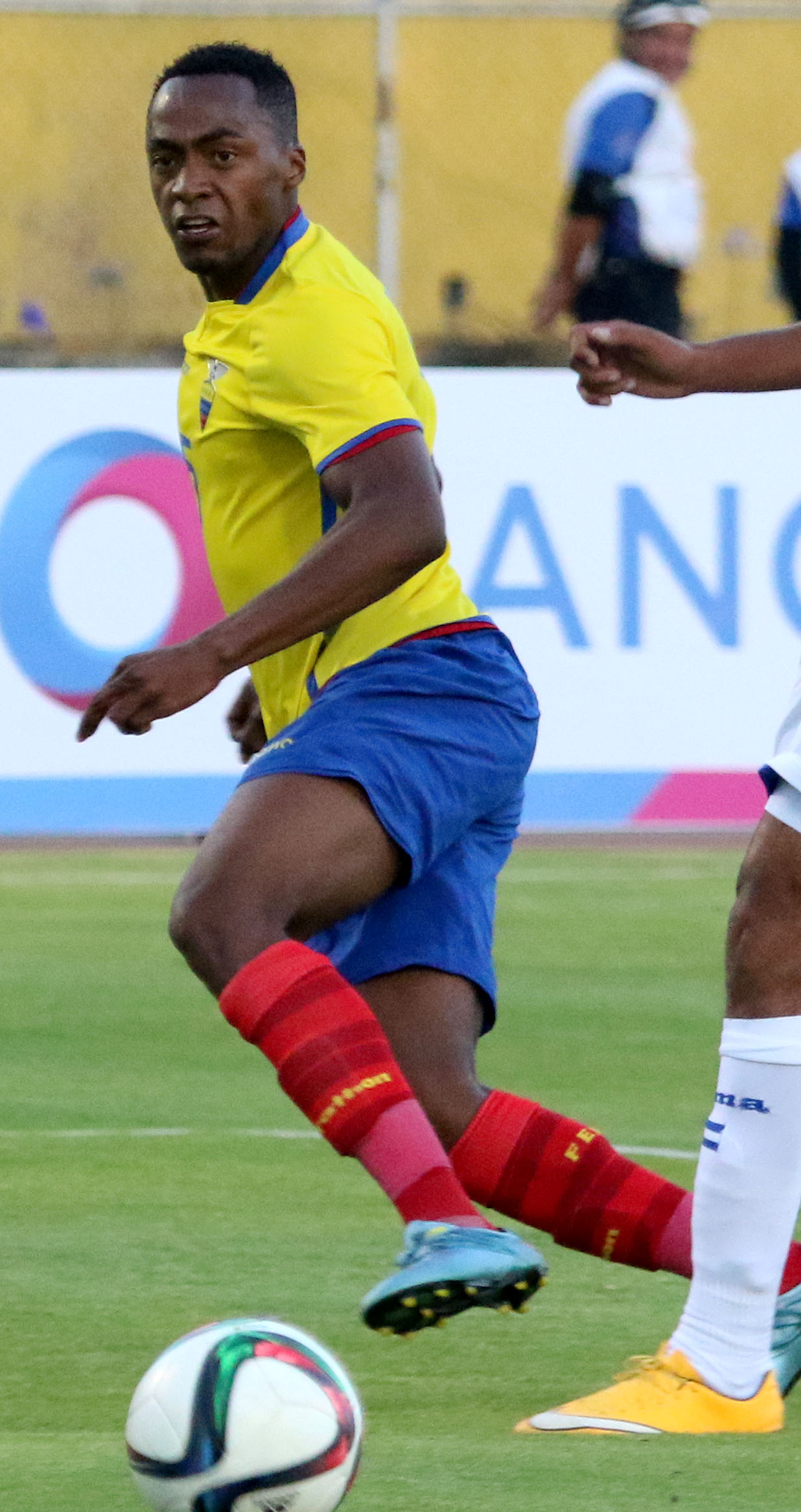 Quito, 08 de sept. (Andes).-Ecuador enfrenta a Honduras en partido amistoso jugado en el estadio Olimpico Atahualpa. En la gráfica Renato Ibarra (6) de Ecuador, remata el balón ante la marca de César Oseguera (21) de Honduras. Foto:César Muñoz/Andes